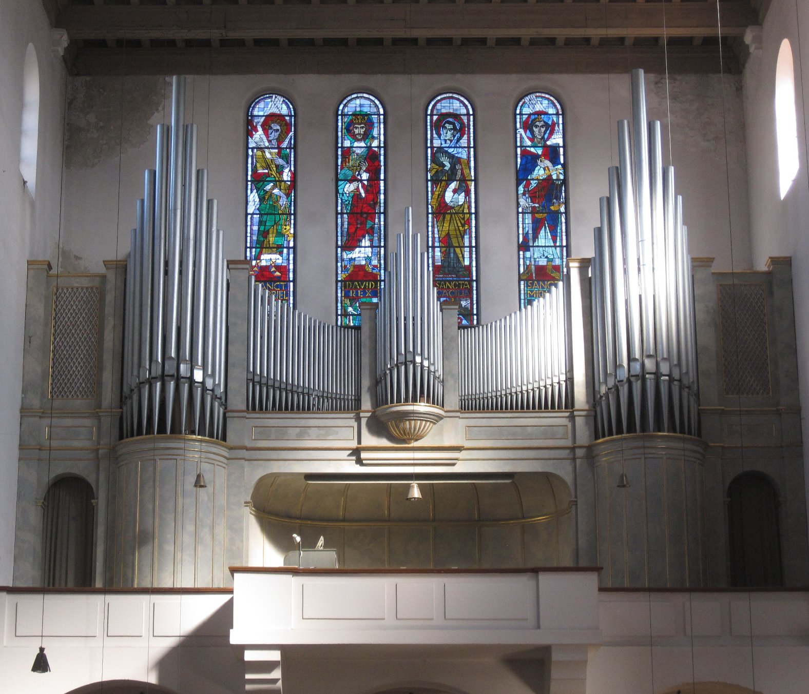 Orgel von St. Maximilian in München